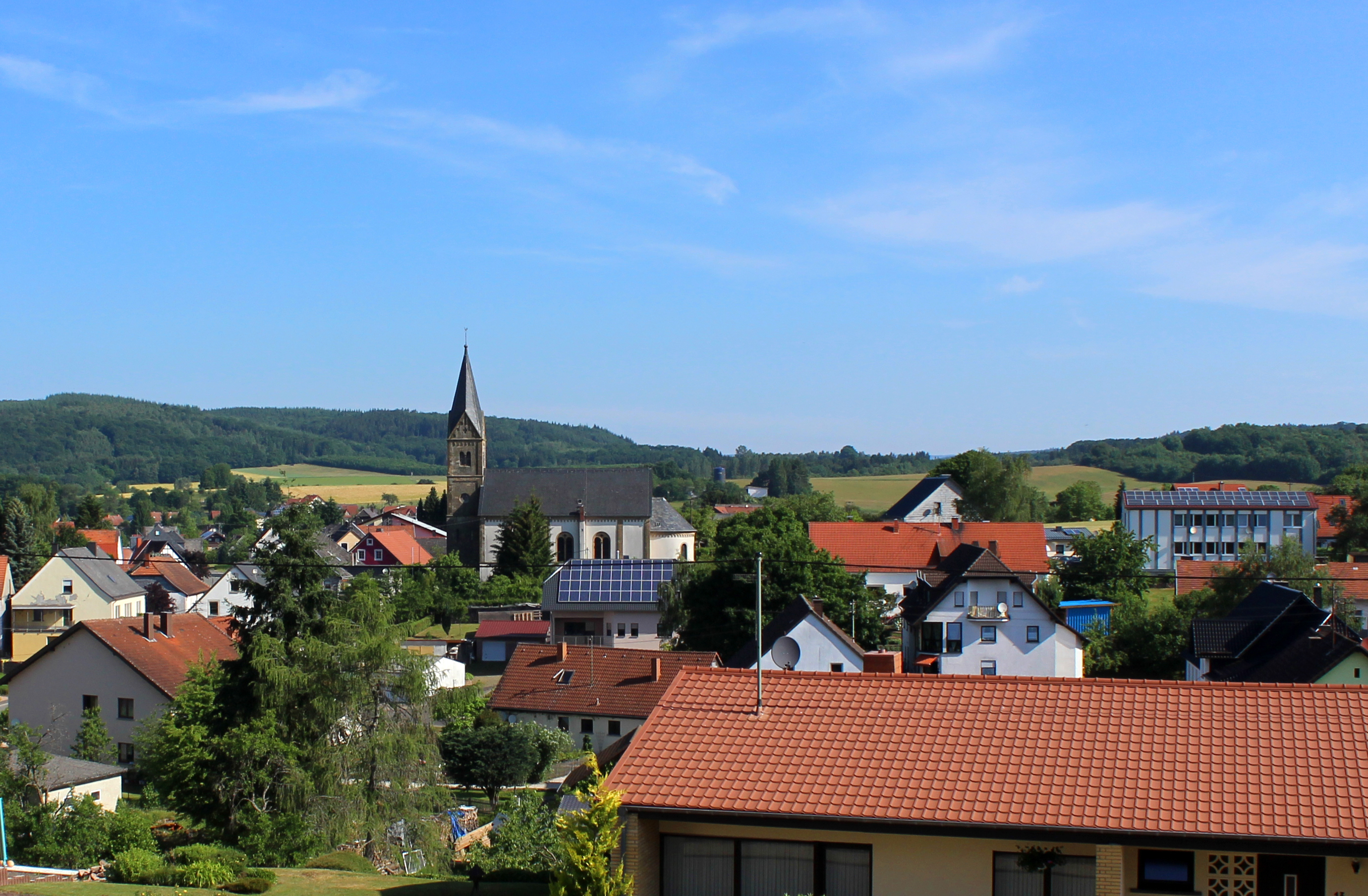 Ansicht von Wolfersweiler, Gemeinde Nohfelden, Landkreis St. Wendel, Saarland. Blick aus südlicher Richtung von der evangelischen zur katholischen Kirche.